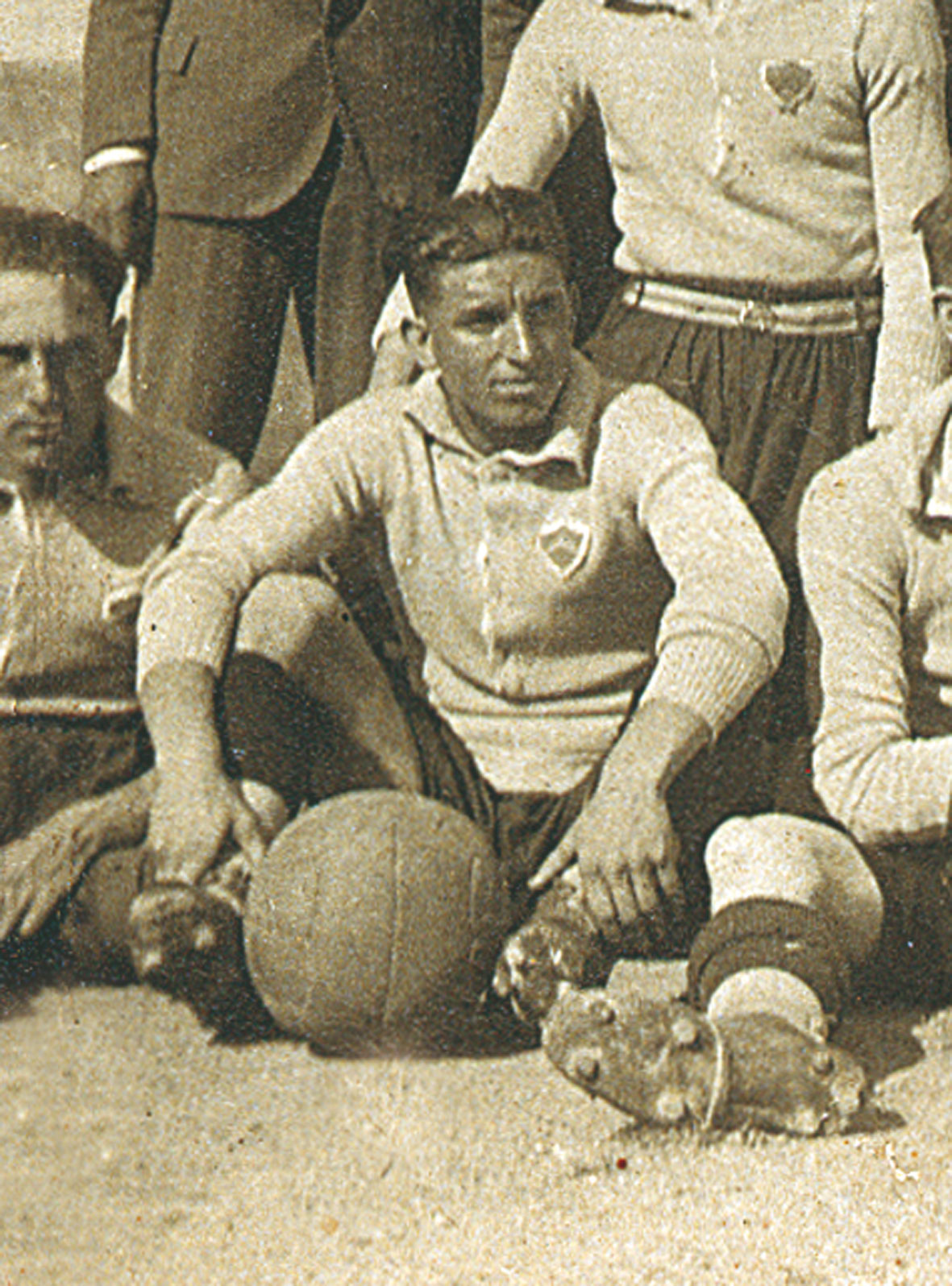 Oreste Benatti detto "Bighina" (1926)